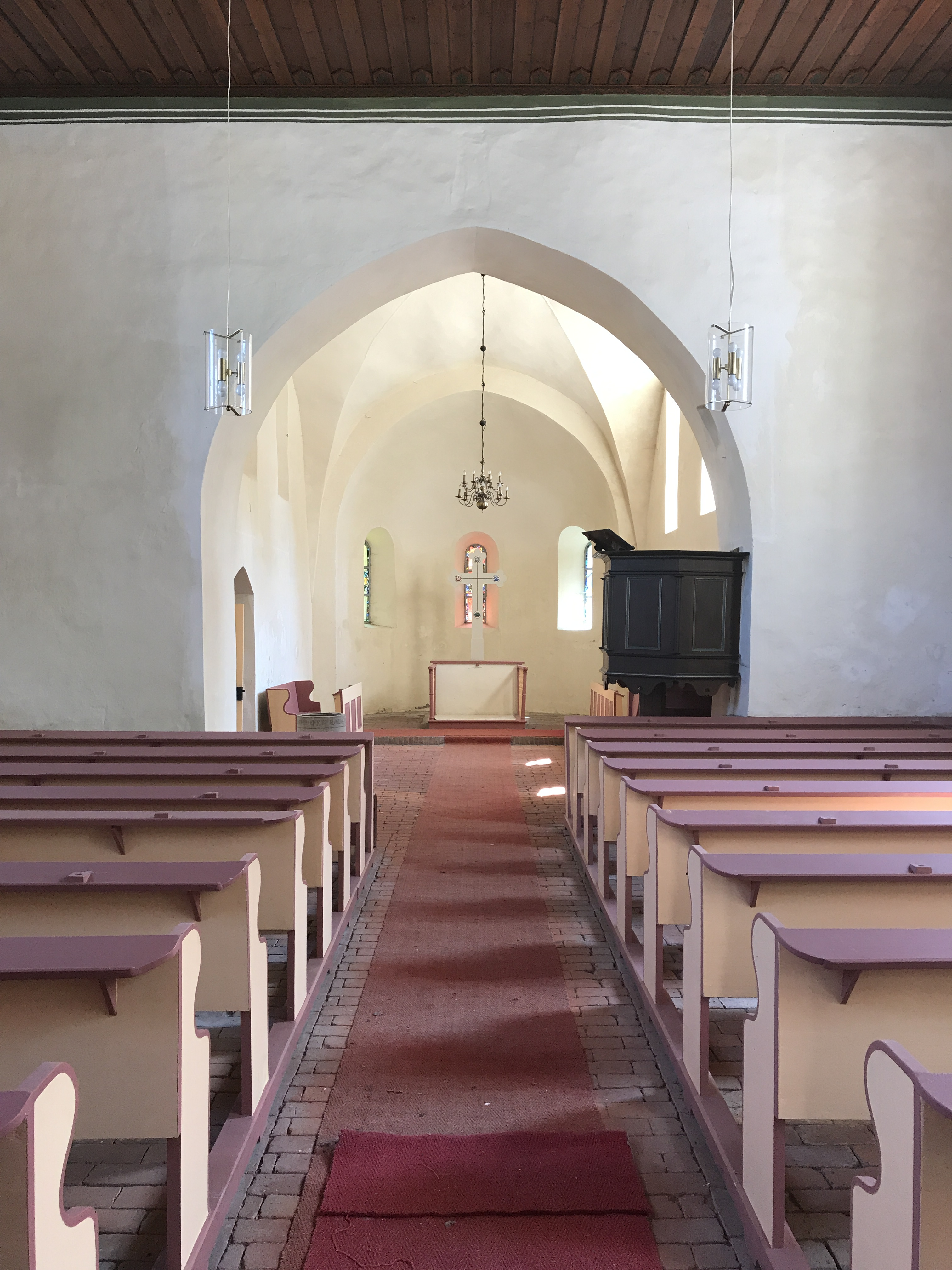 Die Dorfkirche Klosterdorf in Oberbarnim ist eine Feldsteinkirche aus der zweiten Hälfte des 13. Jahrhunderts im Landkreis Märkisch-Oderland im Land Brandenburg.